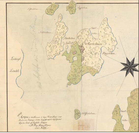 Storholmen med omkringliggande öar norr om Lidingö på en karta upprättad 1784.